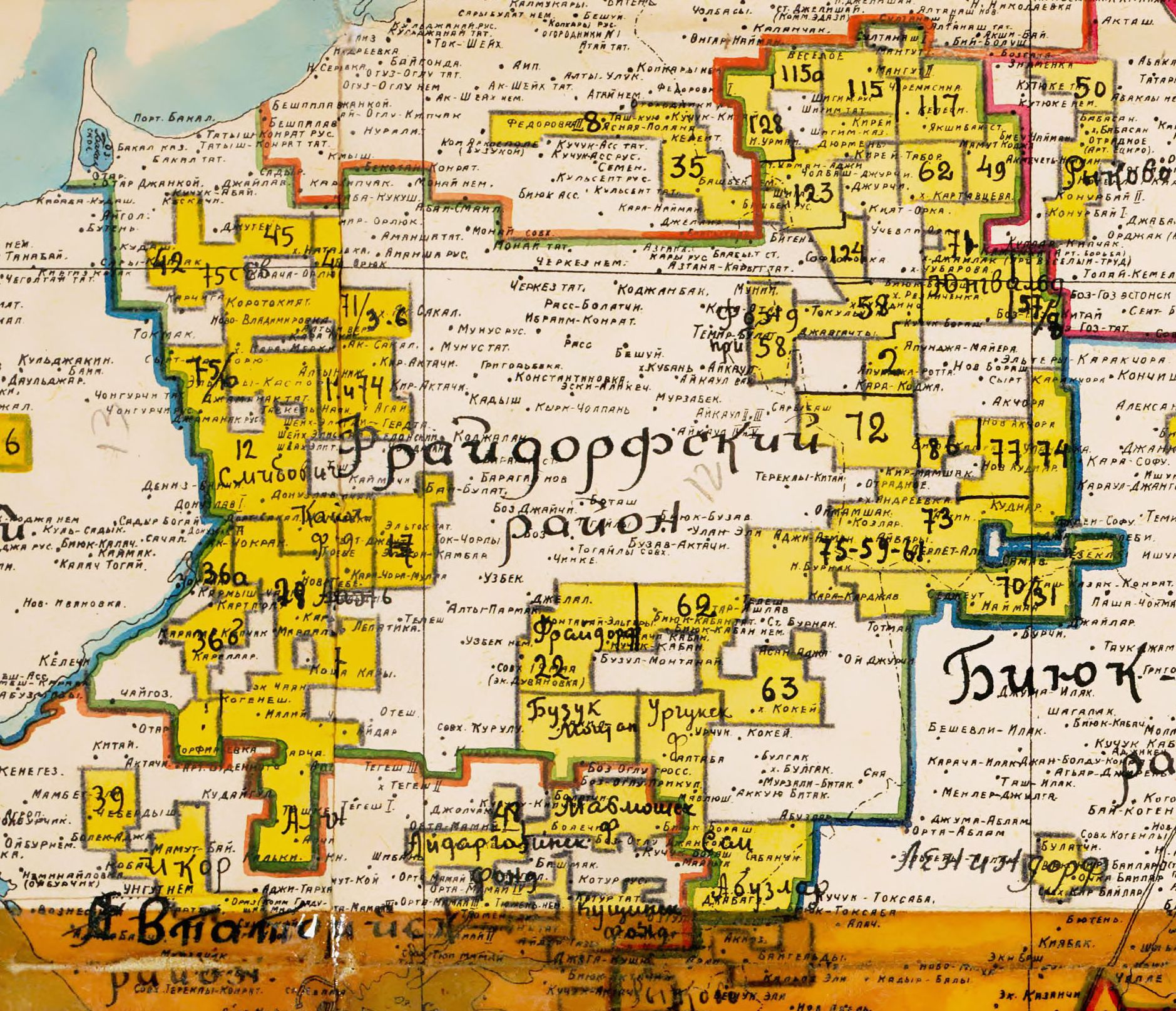 Фрайдорфский район в границах 1931 года